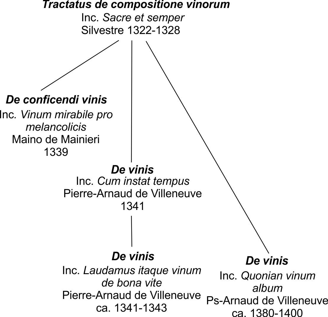 Généalogie du manuscrit De vinis, version simplifiée d'un schéma tiré José Rodriguez Guerrero, El Origen del Pseudo-arnaldiano Liber de vinis,... Azogue, 7, 2013